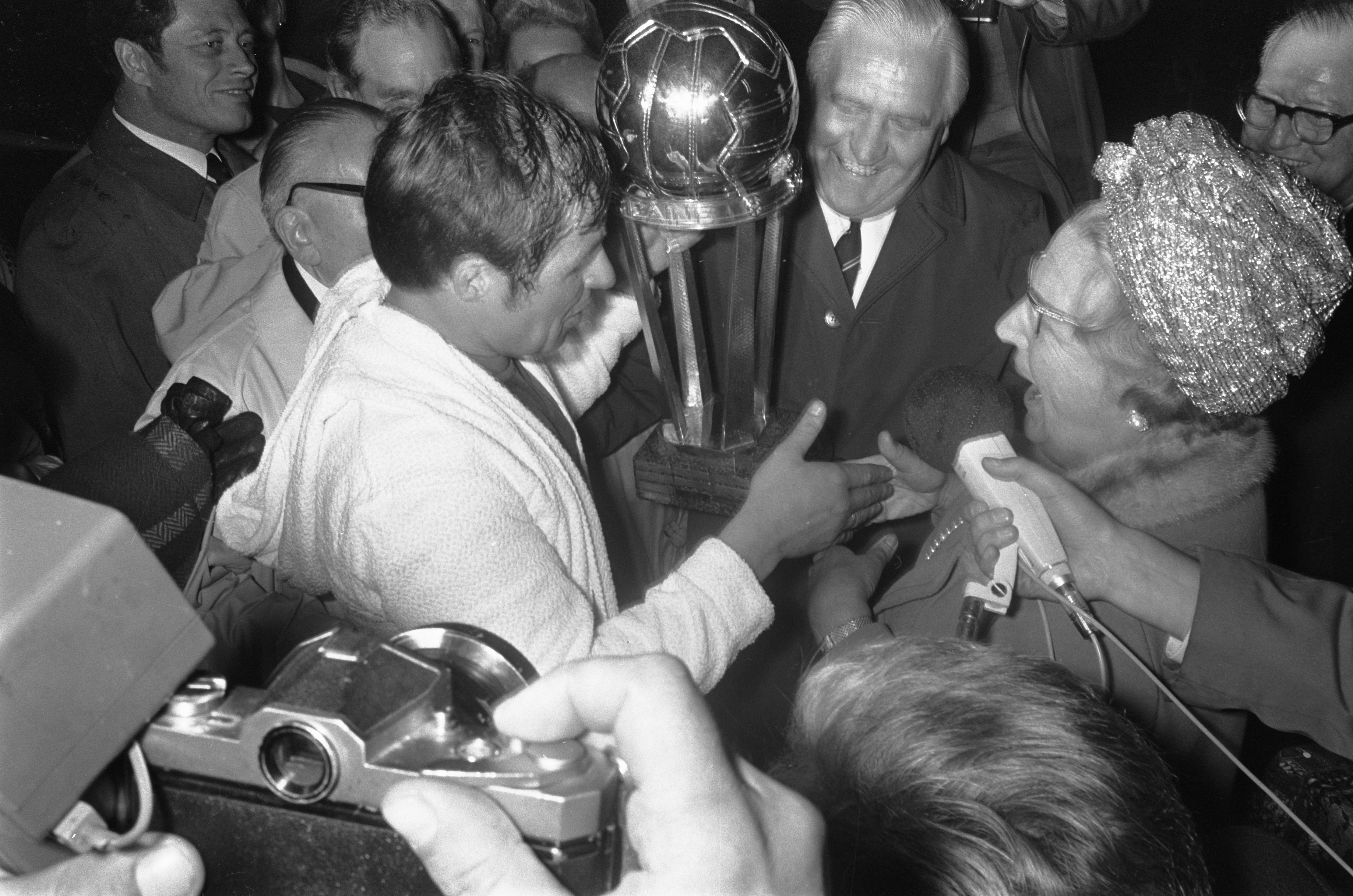 Collectie / Archief : Fotocollectie Anefo Reportage / Serie : Feijenoord tegen Estudiantes 1-0; Feijenoord wint World beker ; Hare Majesteit koningin Juliana geeft R. Israel de beker midden voorzitter Couwenberg (Feijenoord) / Beschrijving : Koningin Juliana geeft Rinus Israel de beker, in het midden voorzitter Couwenberg van Feyenoord Datum : 9 september 1970 Trefwoorden : bekers, koninginnen, sport, voetbal, voorzitters Persoonsnaam : Couwenberg, Israël, Rinus Instellingsnaam : Feyenoord Fotograaf : Fotograaf Onbekend / Anefo Auteursrechthebbende : Nationaal Archief Materiaalsoort : Negatief (zwart/wit) Nummer archiefinventaris : bekijk toegang 2.24.01.05 Bestanddeelnummer : 923-8314